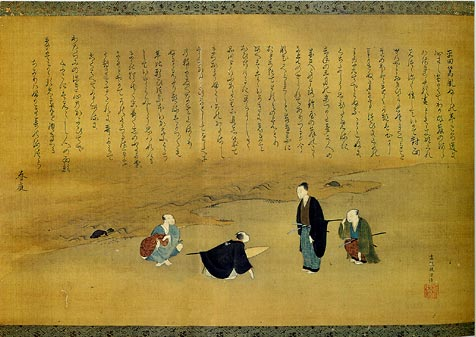 『夢中対面の図』：平田篤胤が夢のなかで本居宣長に会い、入門を許可されたことを絵画にしたもの。